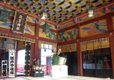 江戸千住葱を浅草神社（三社様）にて奉納した際の写真